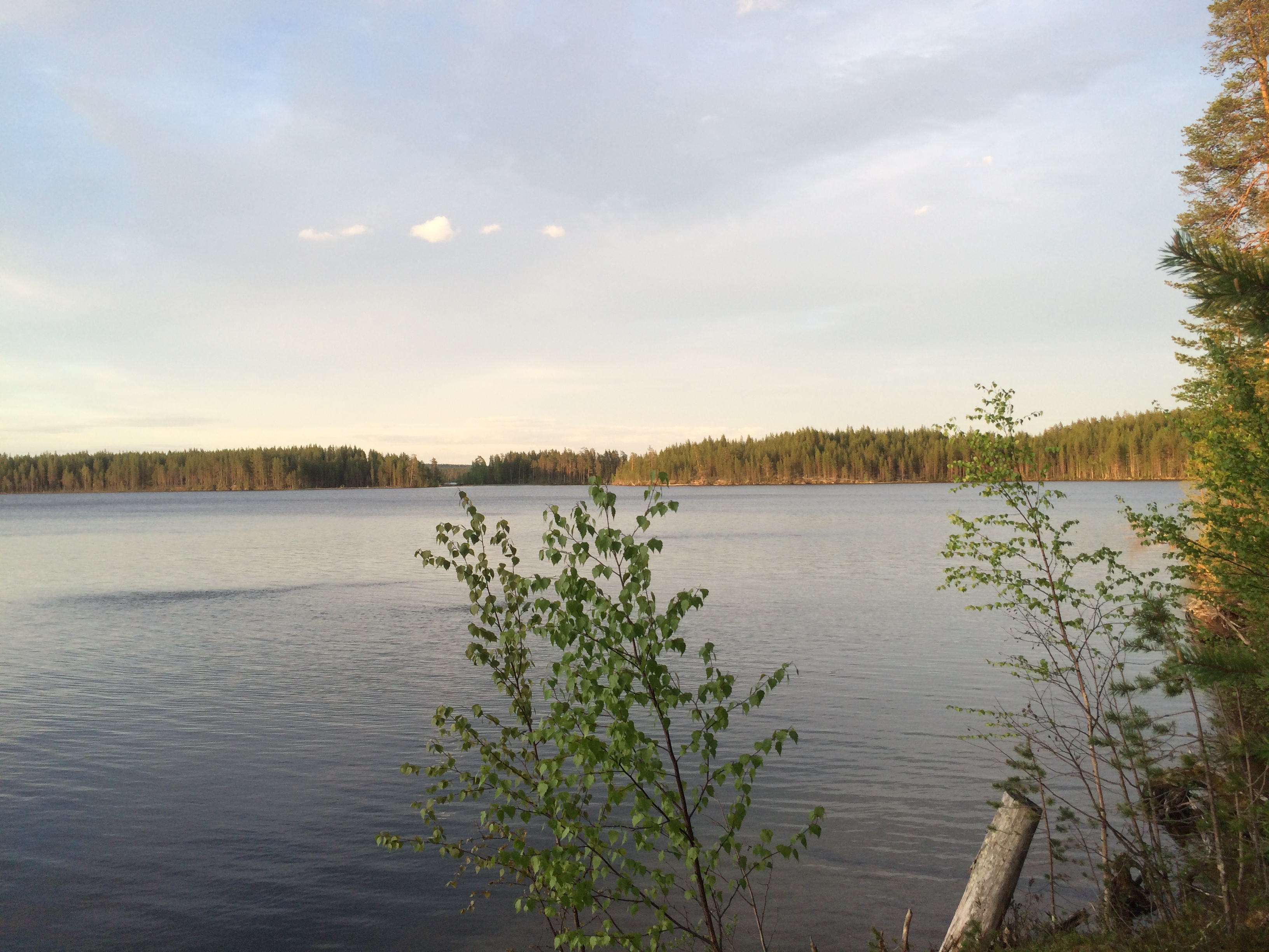 Большое Пертти